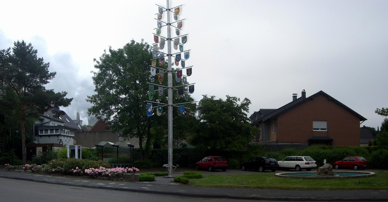 Vereinsbaum in der Mitte von Neurath.